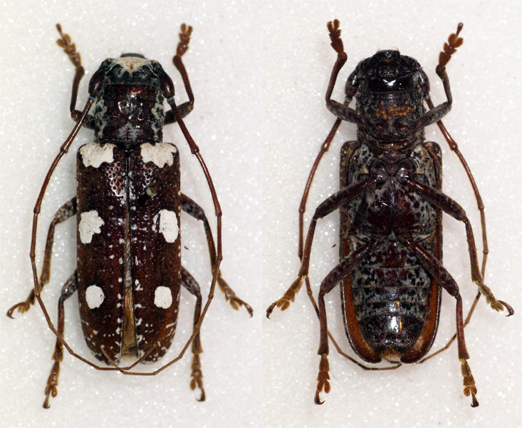 Klug,1833 Sex: Female Data: 03-2011 - Moramanga - Madagascar Size: ?